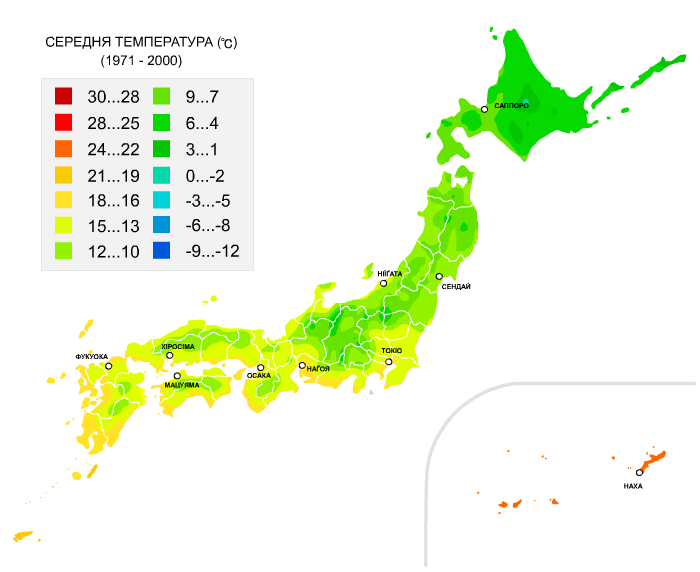 Середня температура Японії (1971 — 2000)